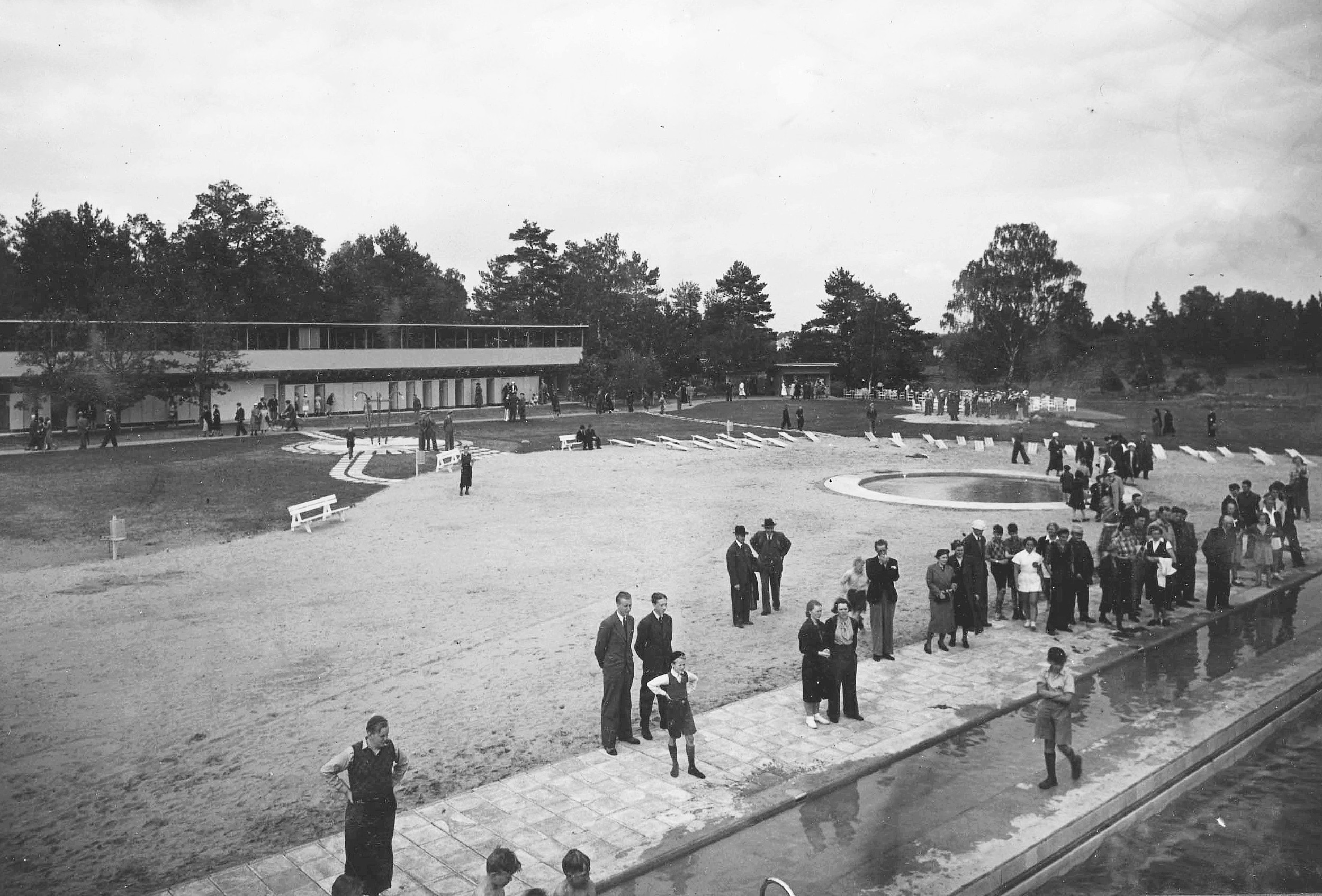 Älvsjöbadet: Från badets invigning 22 juni 1938.